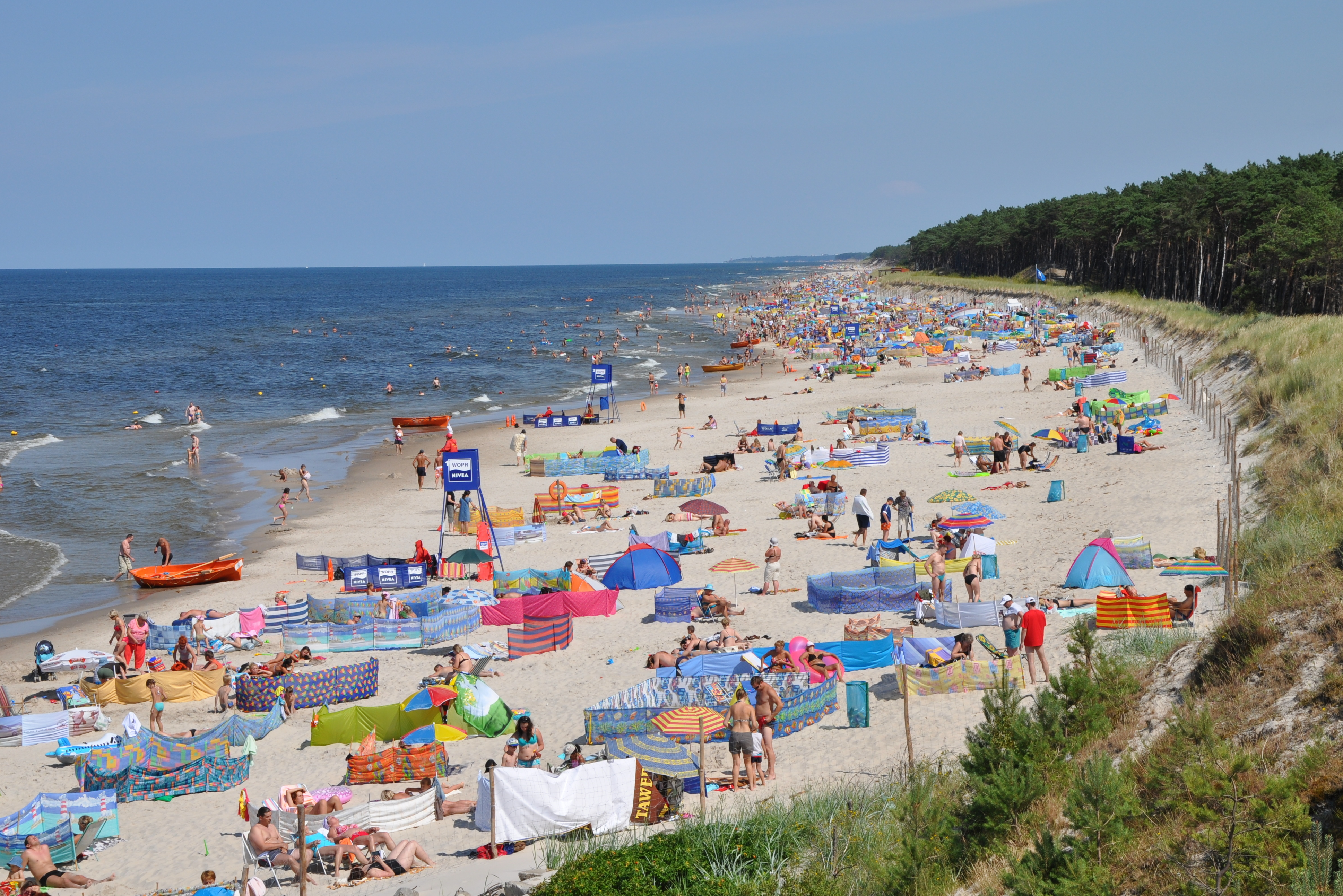 Kąpielisko na plaży we wschodniej części Mrzeżyna